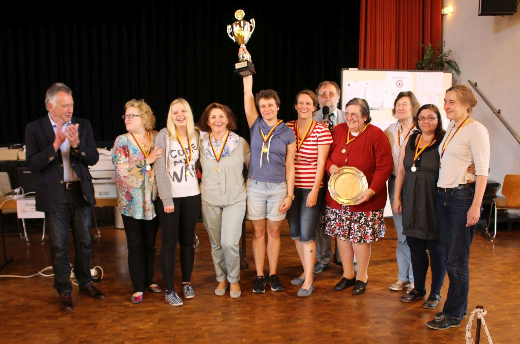 Das Siegerteam Bayern der DFMM der LV in Braunfels 2016 (v.l.n.r.): Nellya Vidonyak, Kristin Braun, Olga Birkholz, Nadia Jussupow (mit Pokal), Carolin Dirmeier, Oda Lorenz, Milka Ankerst, Barbara Niedermaier und Marianne Spiel.